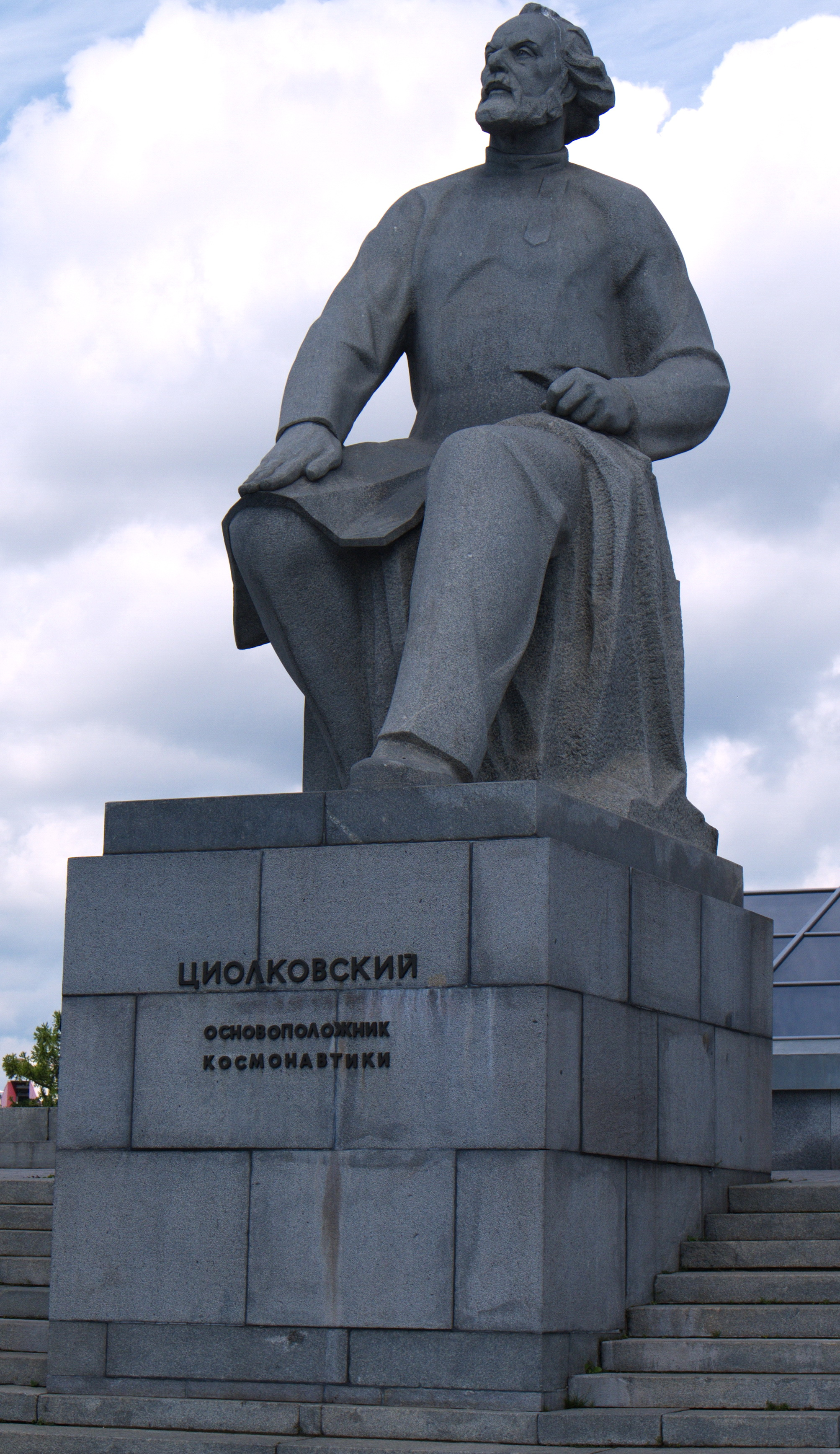 Константин Эдуардович Циолковский — российский ученый и изобретатель, основоположник современной космонавтики